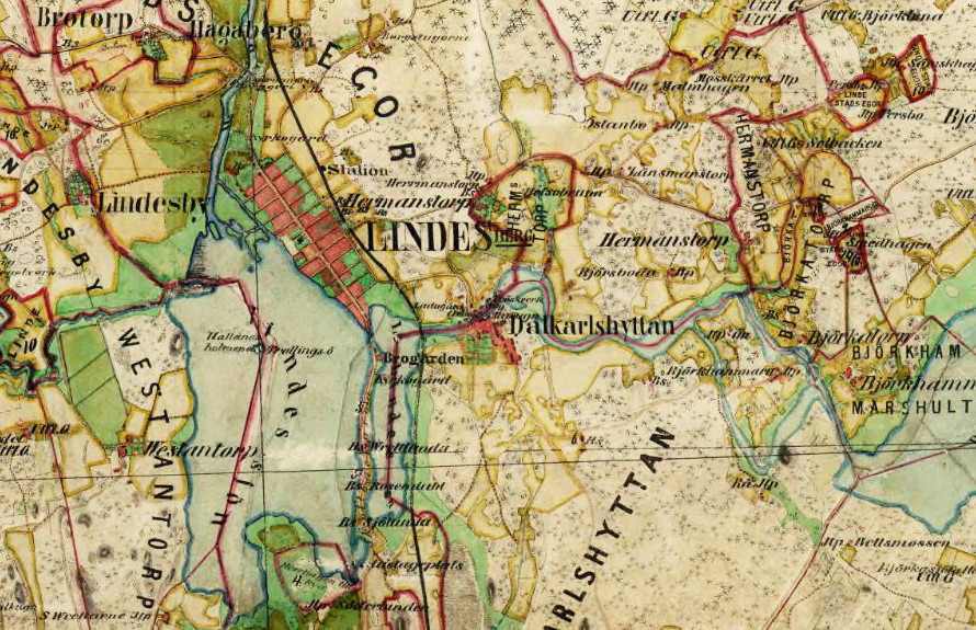 Del av Häradsekonomiska kartan visande Lindesberg